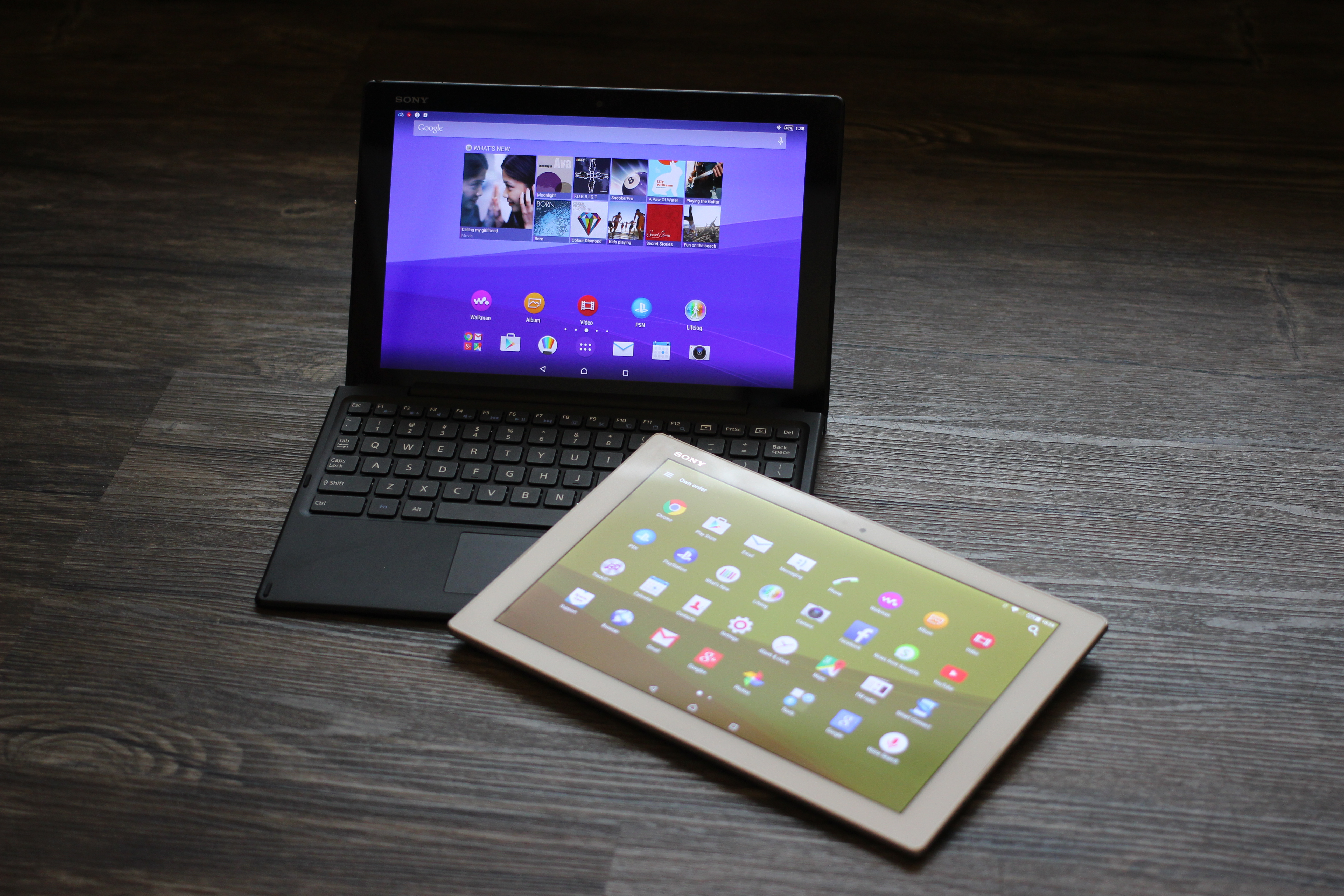 Sony Xperia Z4 Tablet